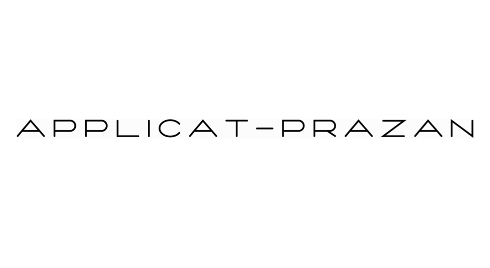 Logo Applicat-Prazan